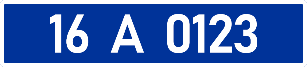 نمونه پلاک ترکیه